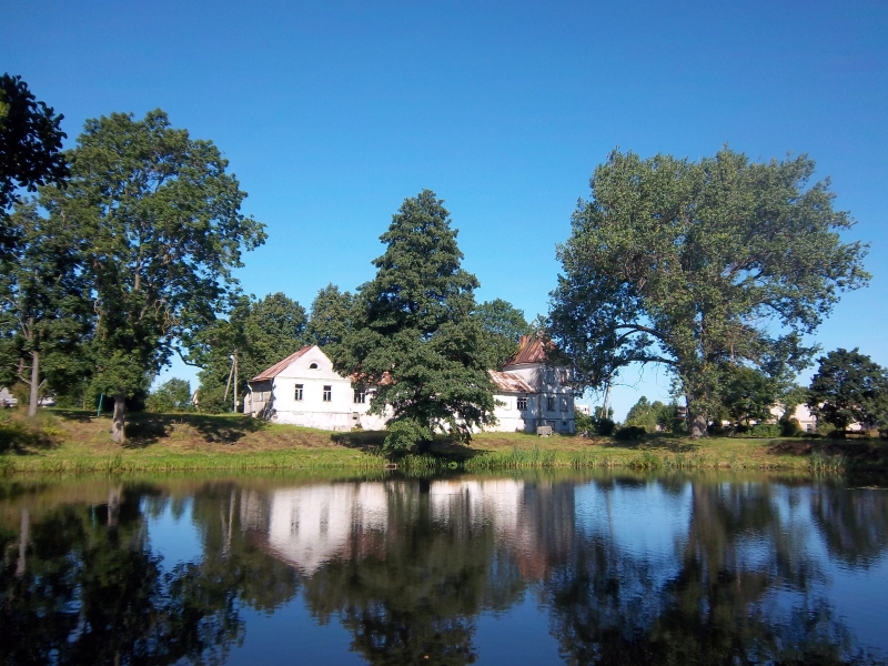 Vladikiškių dvaras